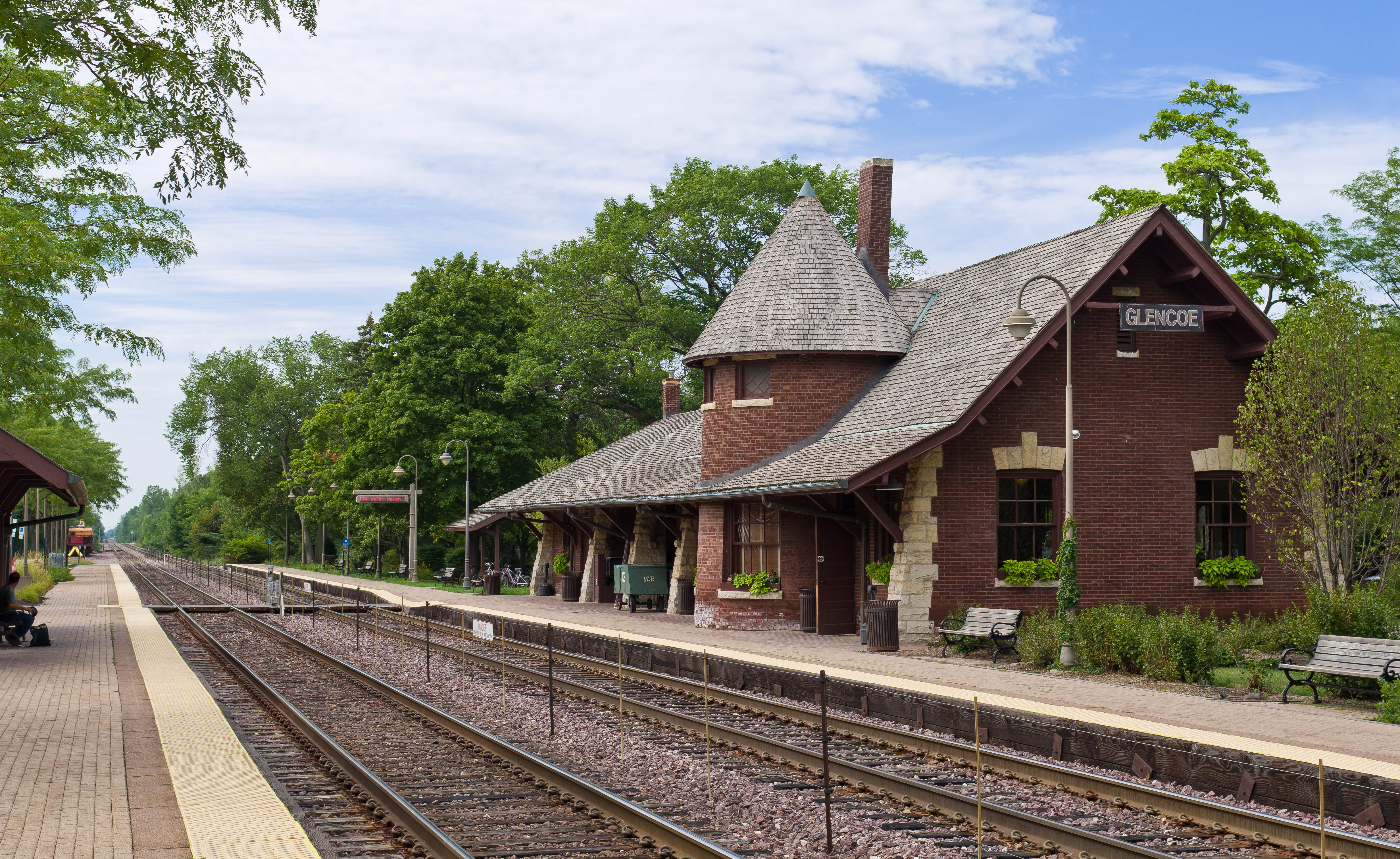 Glencoe Metra Station, Glencoe, Illinois.